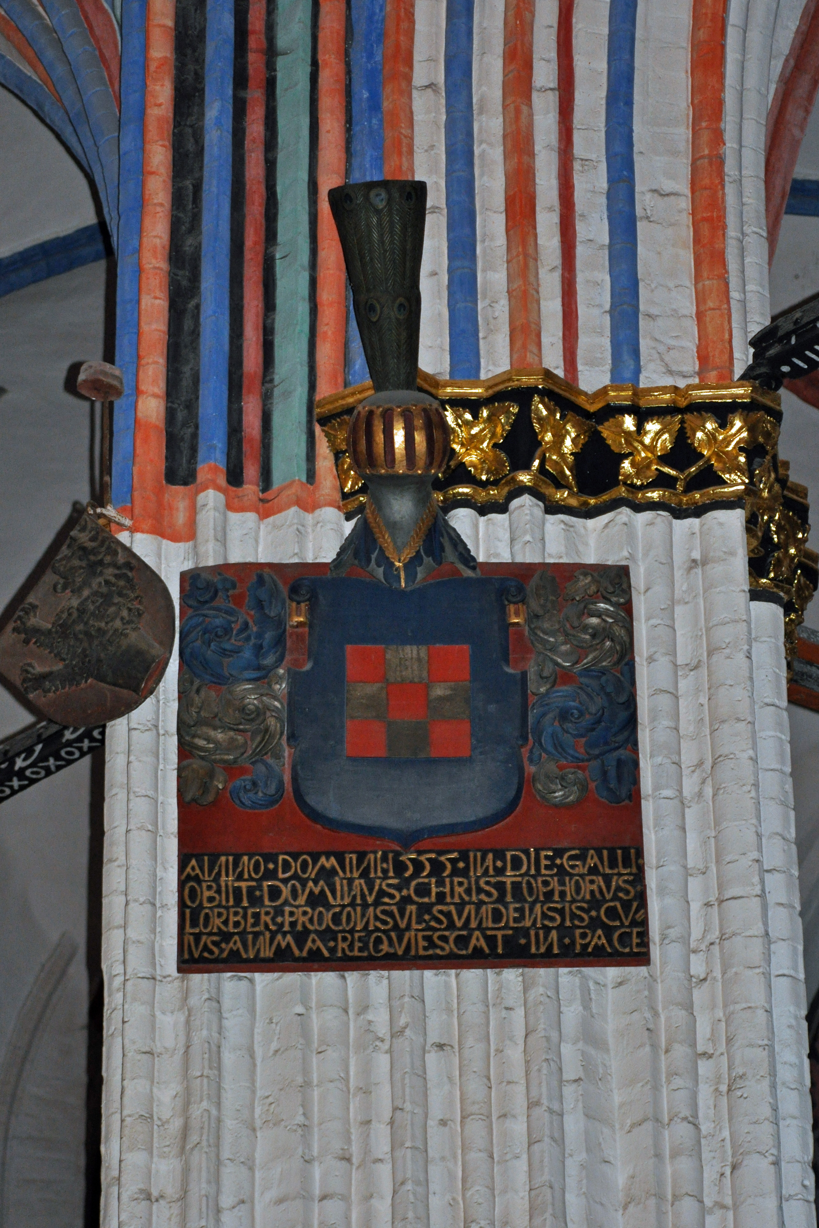 Stralsund, Nikolaikirche, Epitaph Christophorus Lorber (2012-12-29), by Klugschnacker in Wikipedia